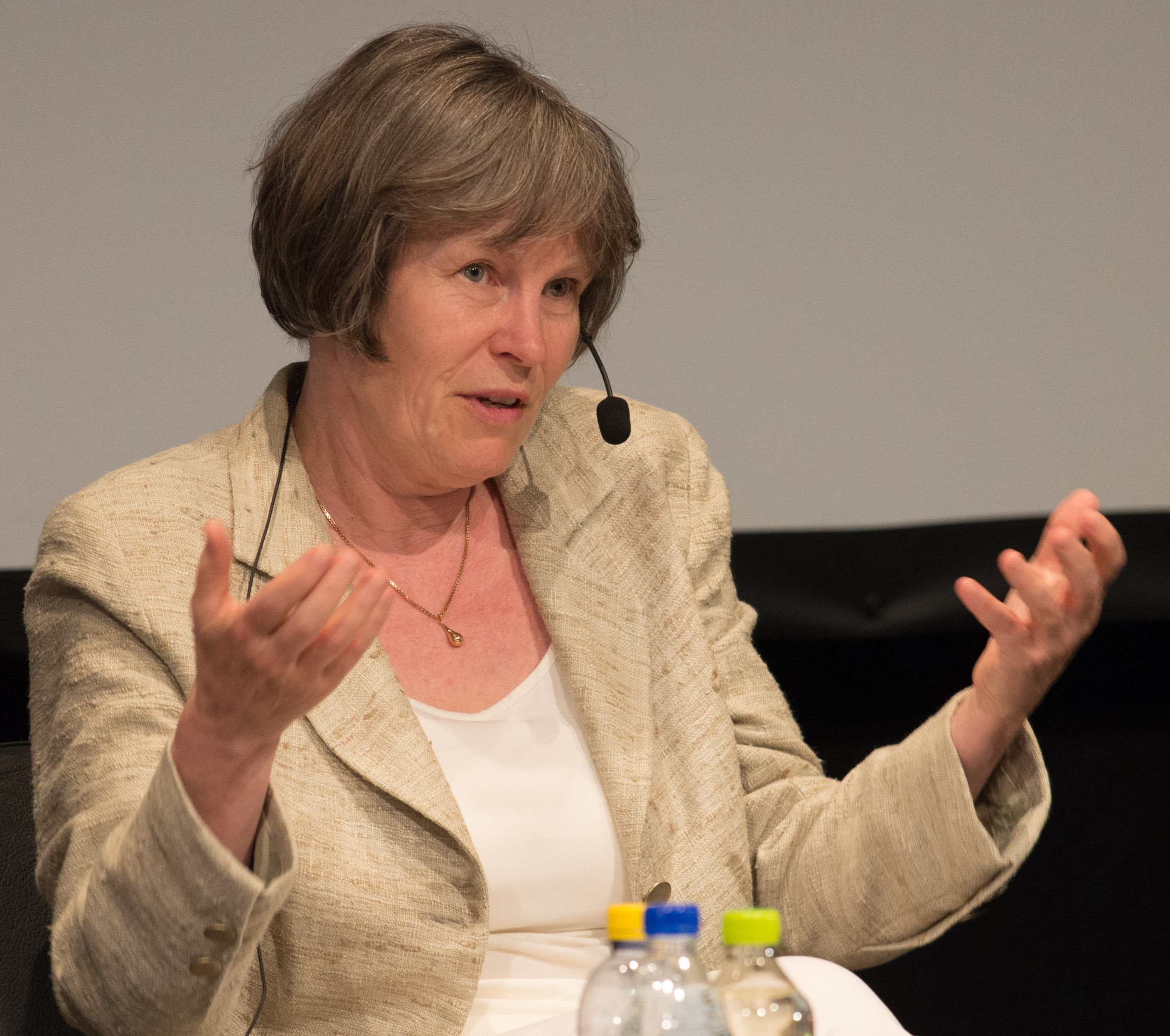 Karin Rehnqvist på Gannevik Talks på Kulturhuset i Stockholm den 24 maj 2015.